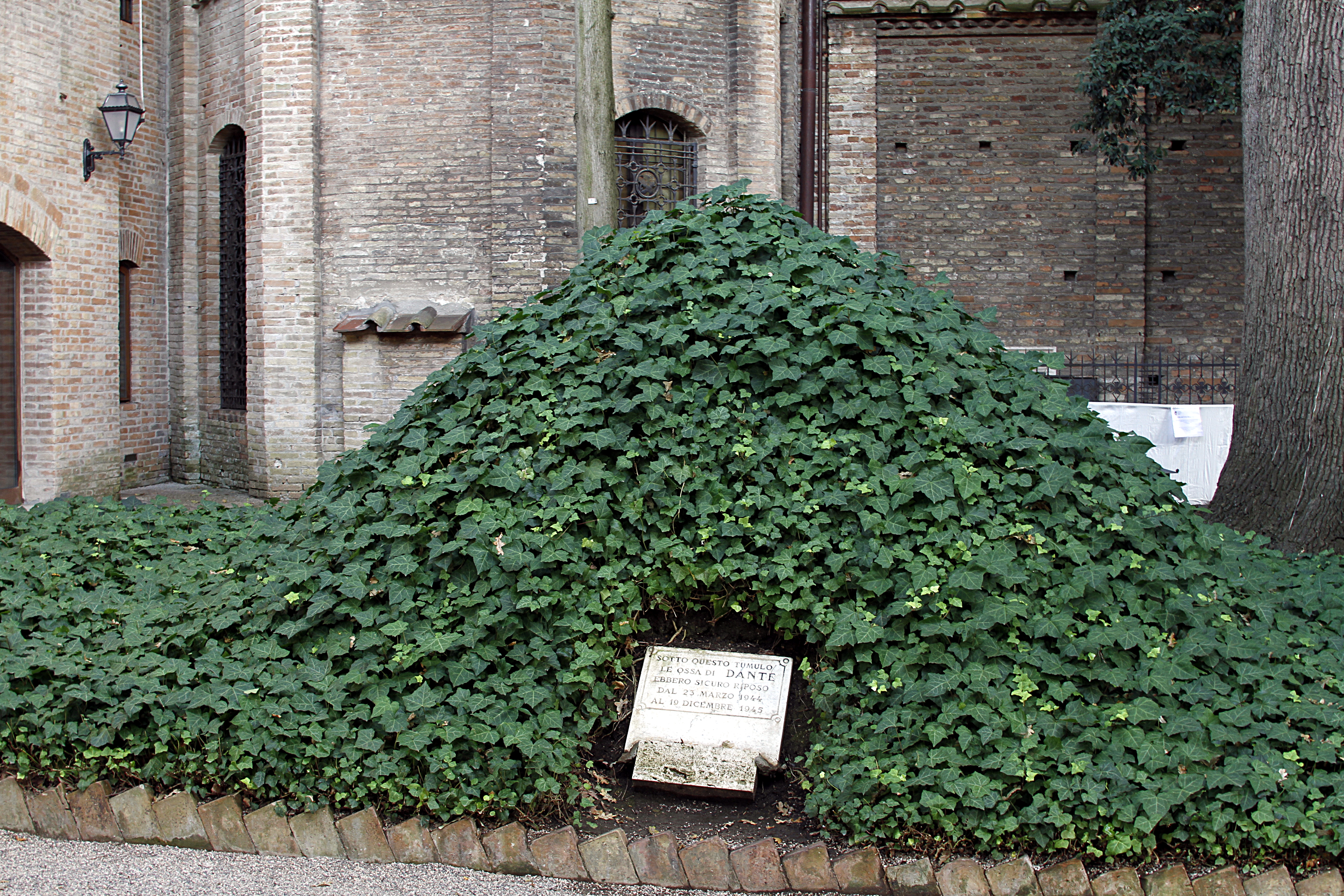 Garden of San Francesco - Ravenna